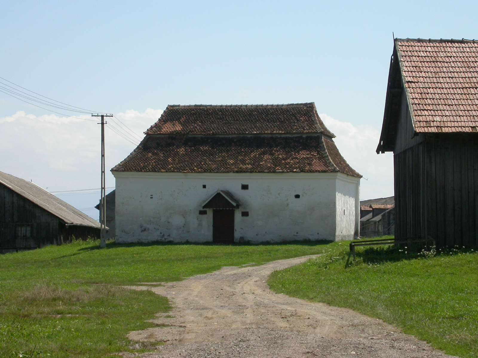 Ansamblul castelului Apor, sec. XVI - XIX